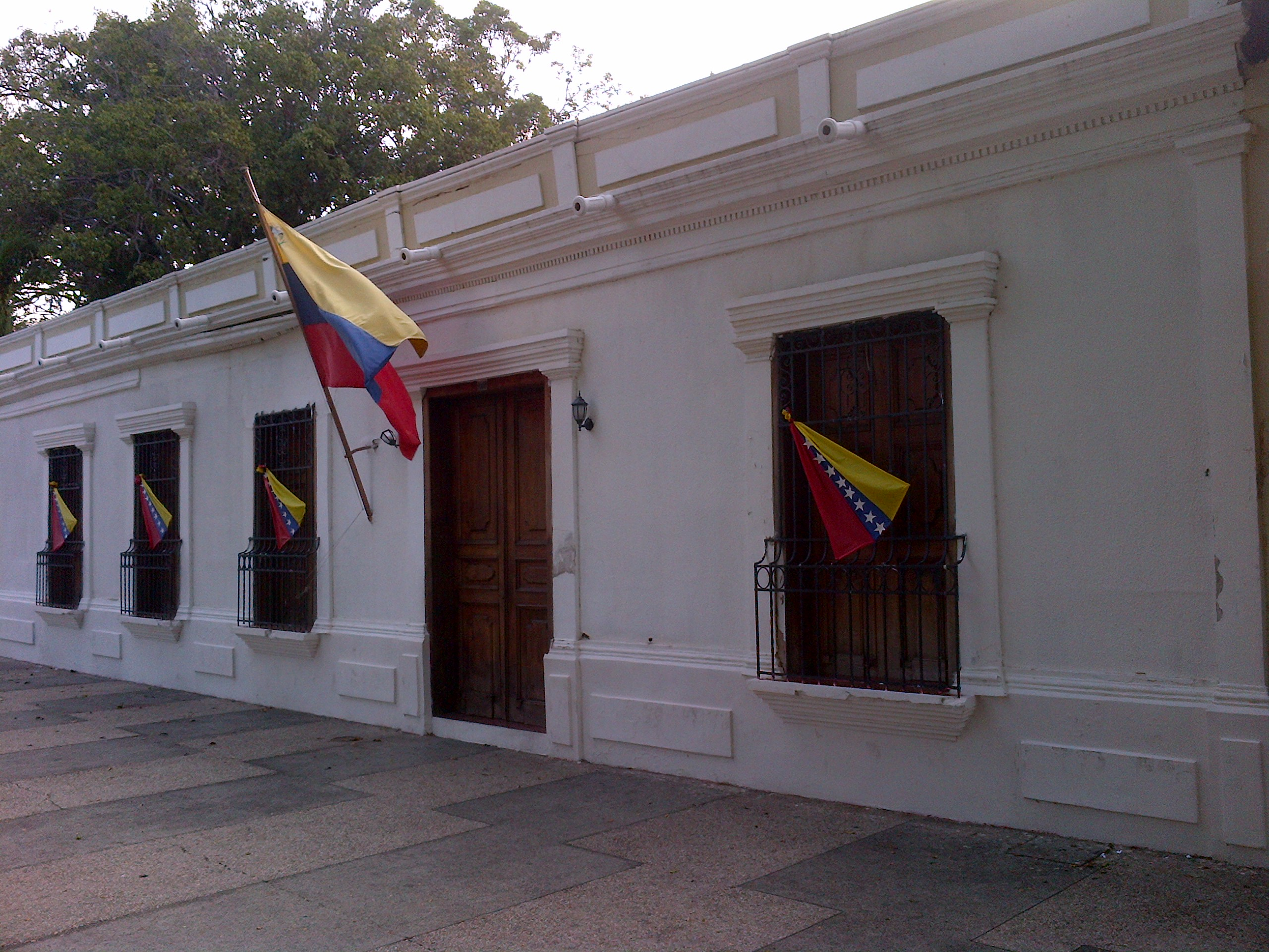 Residencia oficial del gobernador en Cumaná, Venezuela.